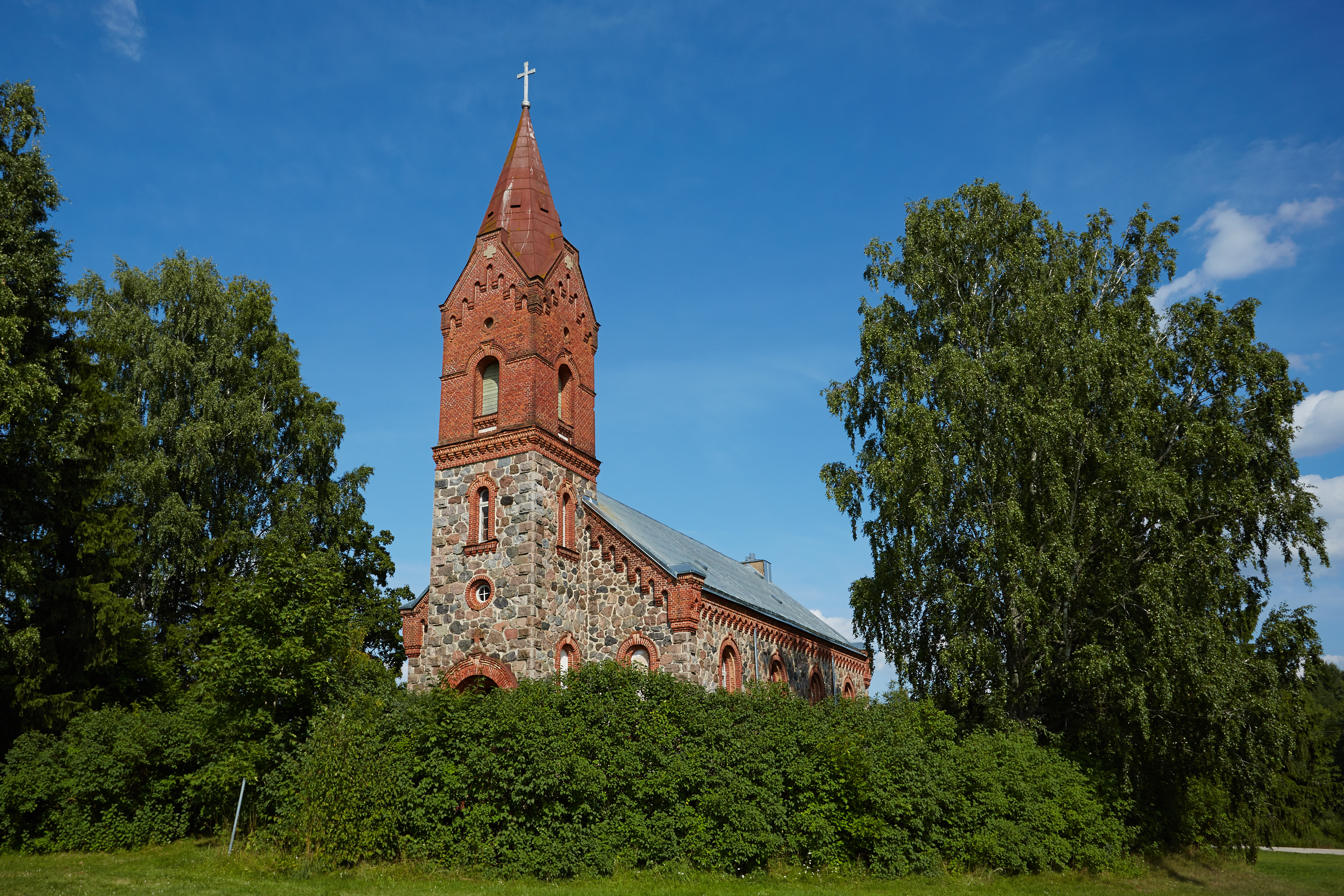 Roosa kirik 2013. aasta augustis.